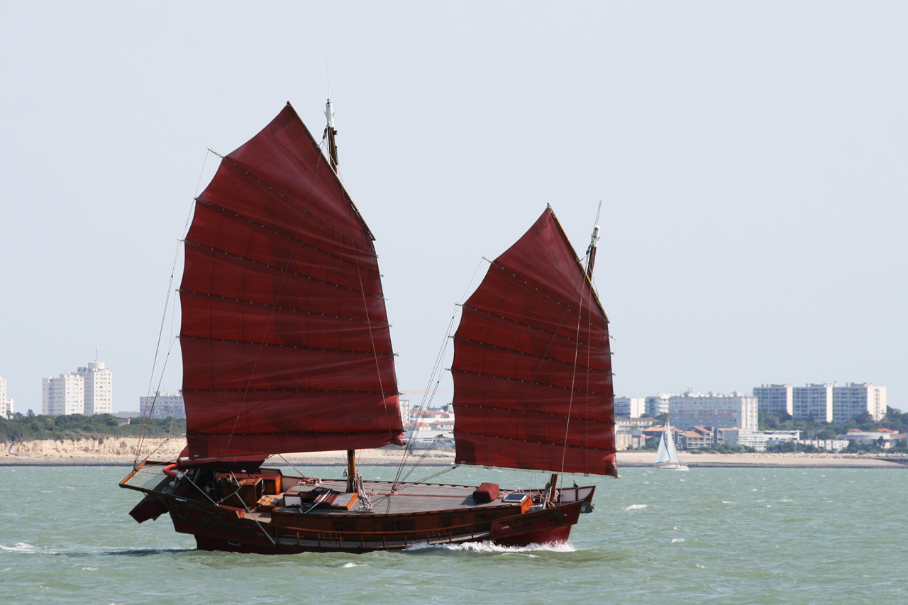 Jonque de plaisance à La Rochelle